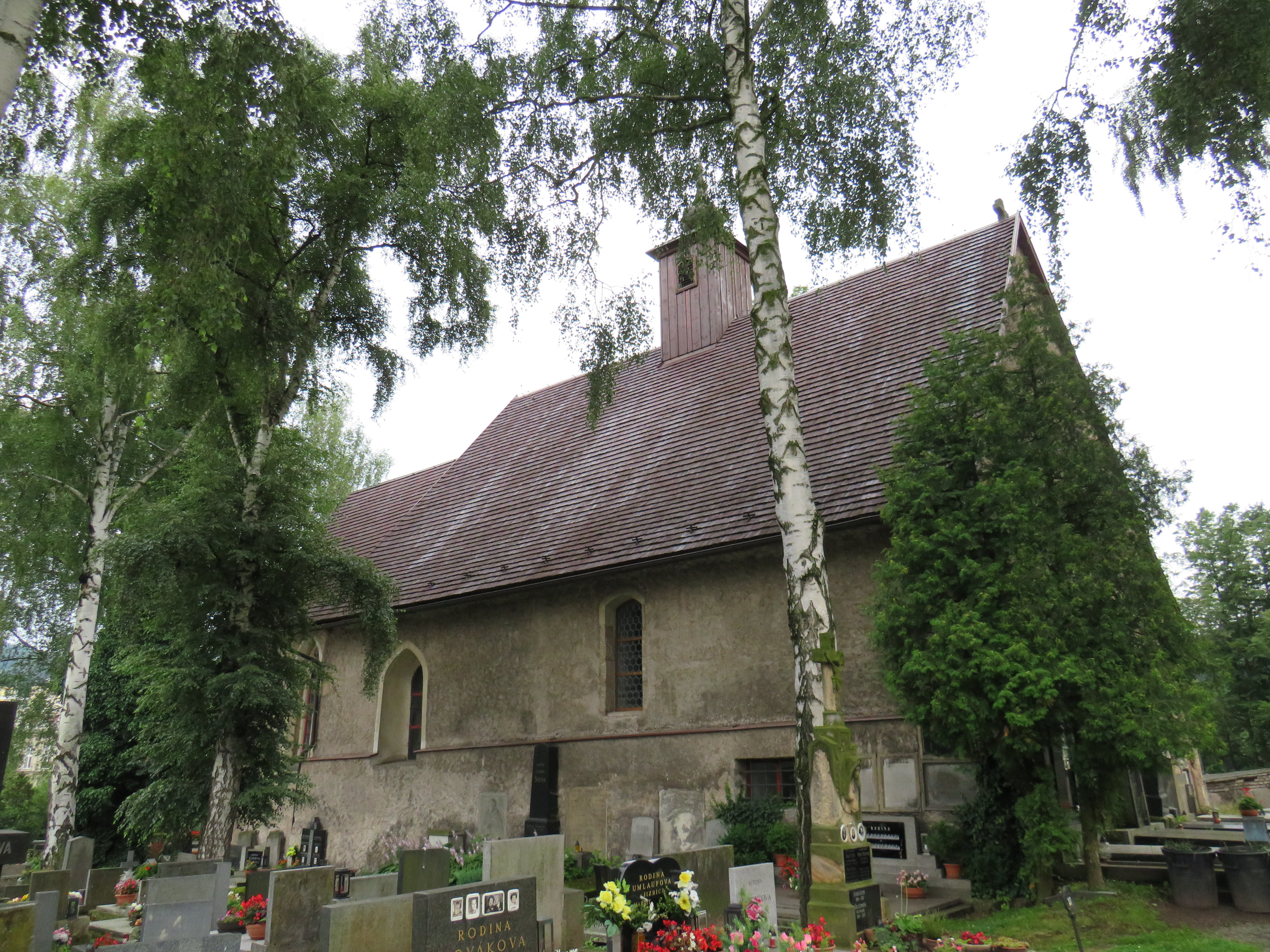 Kostel svatého Jana Křtitele, Náchod.